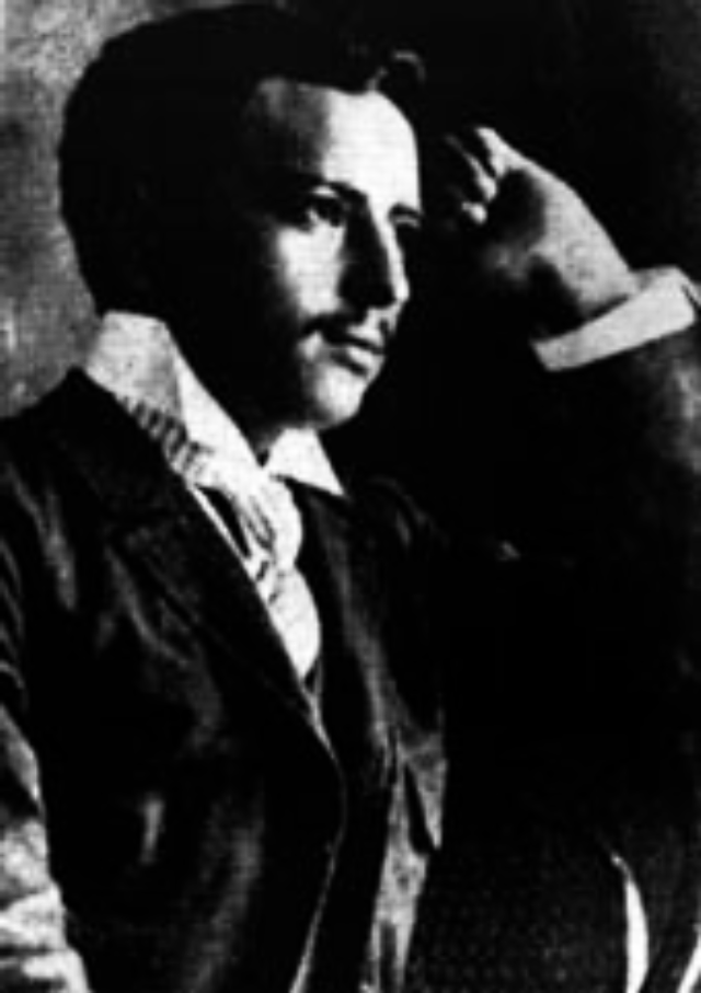 Retrato de Práxedis G. Guerrero (1882-1910), periodista y anarquista mexicano afiliado al Partdo Liberal Mexicano)